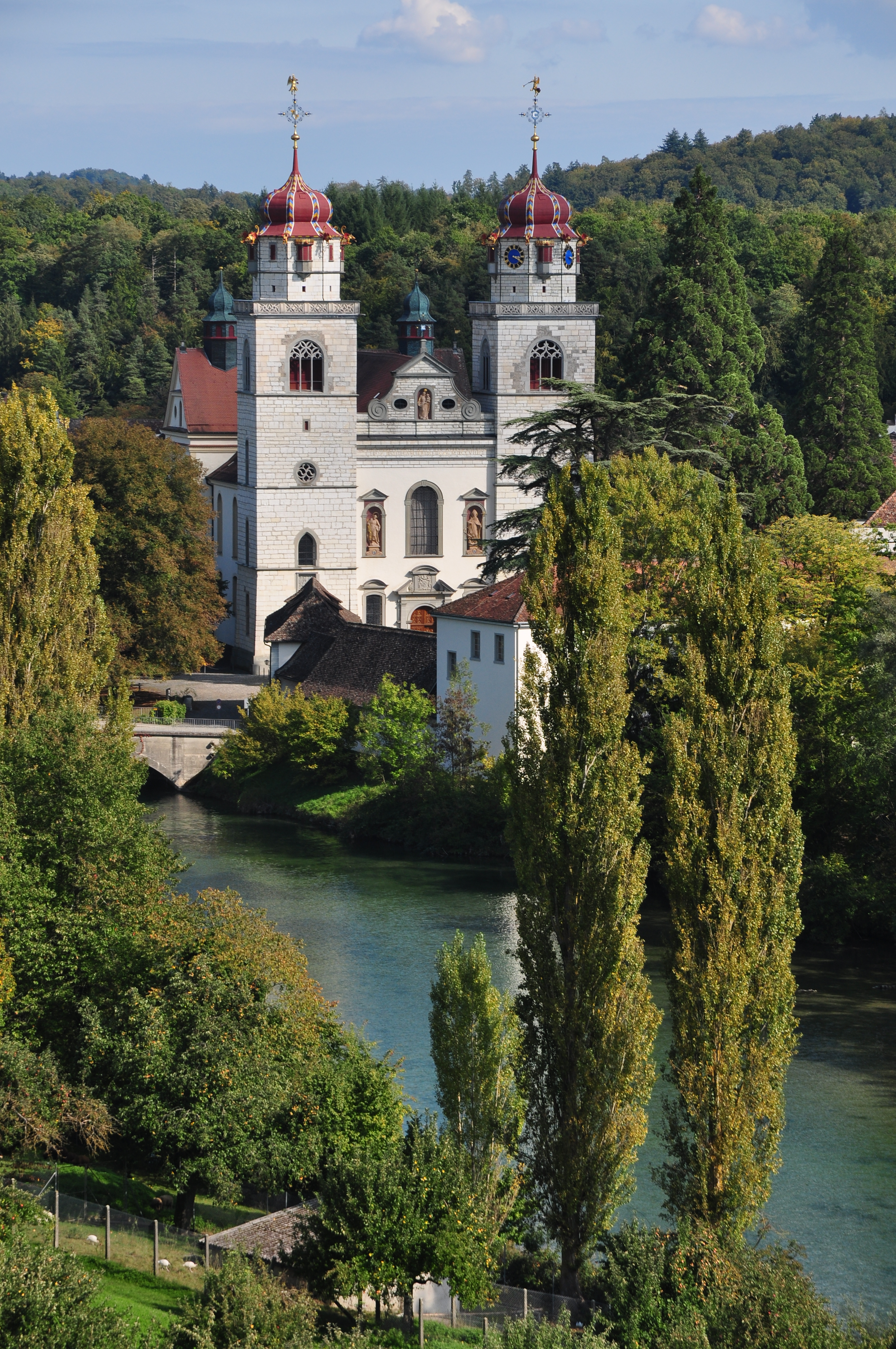 Ehemalige Benediktinerabtei, Alt-Rheinau in Rheinau (Switzerland)